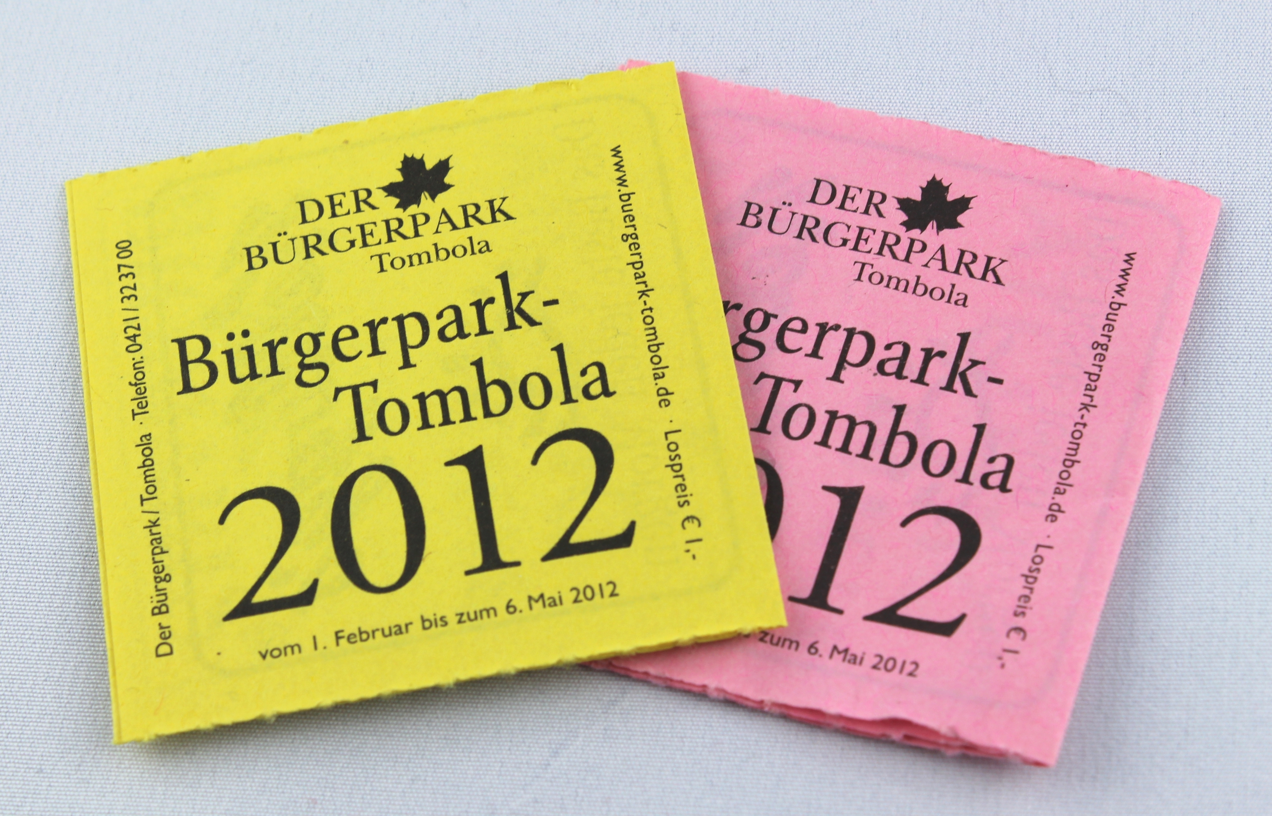 Lose zur Bürgerparktombola 2012